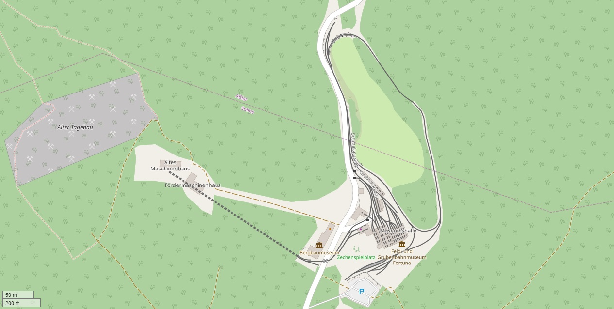 Grube Fortuna bei Solms (OpenStreetMap)